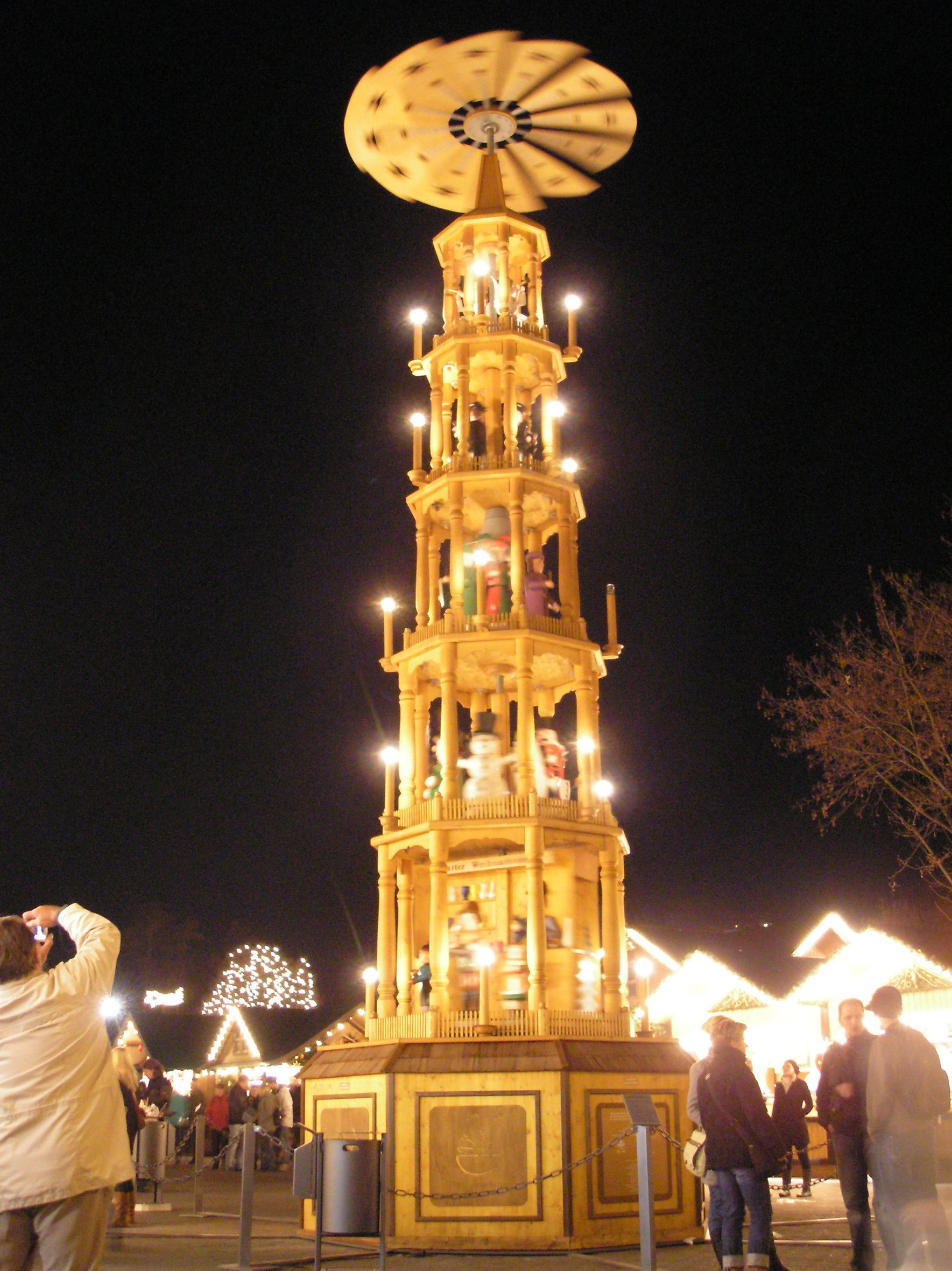 Die Weihnachtspyramide auf dem Erfurter Weihnachtsmarkt.